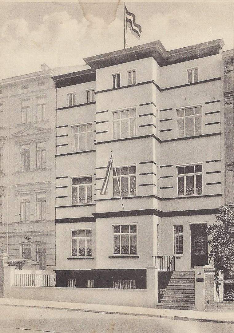 Im Bauhaus-Stil umgebautes Korporationshaus des Corps Neoborussia Halle, Robert-Blumstraße 37